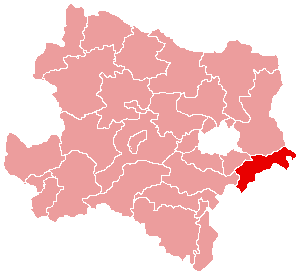 Karte: politischer Bezirk Bruck an der Leitha Lizenz: GNU FDL Quelle: Zeichnung plp Datum: de:2004 Ort: Wien